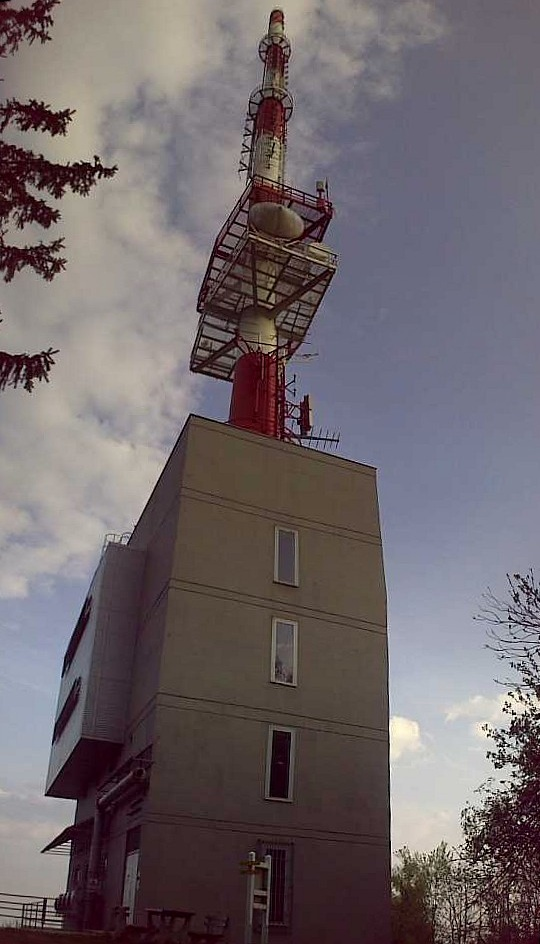 Photo der Rundfunksendeanlage am Großen Hirschenstein im Südburgenland.